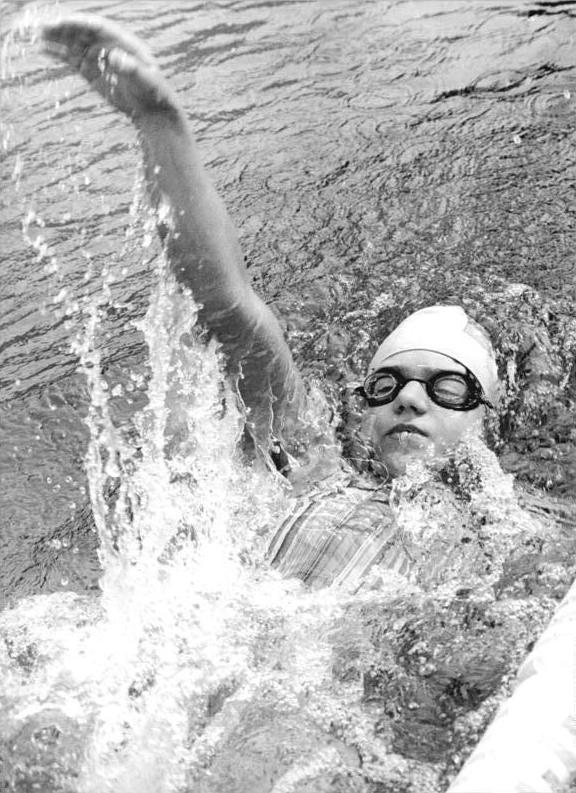 Petra Schneider ADN-ZB Kluge 5.8.79 Brandenburg: 30. DDR-Meisterschaften im Sportschwimmen- Mit guten Leistungen wartete die 16jährige Karl-Marx-Städterin Petra Schneider bei den diejährigen Titelkämpfen auf. Sie gewann Gold über 400 m Lagen, Silber über 200 m Brust, Bronze über 100 m Schmetterling und 200 m Brust.